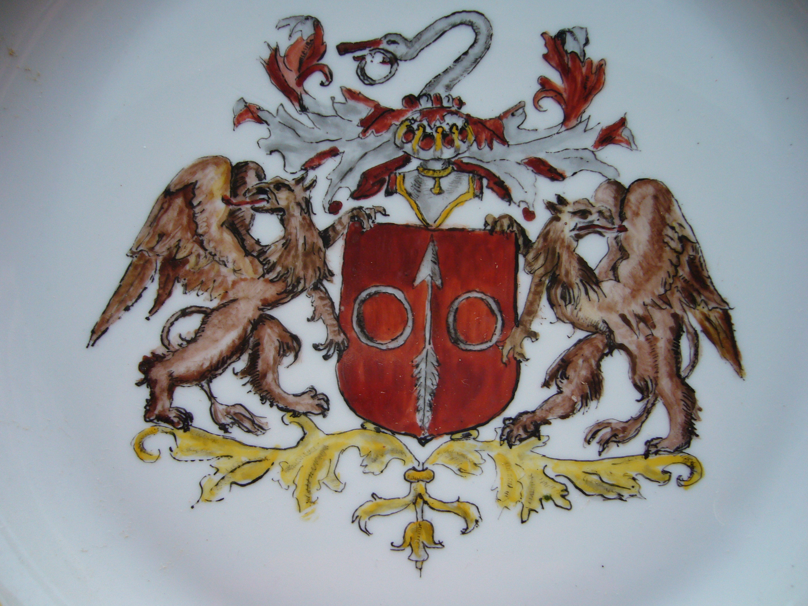 Van Till, familiewapen, op bord geschilderd